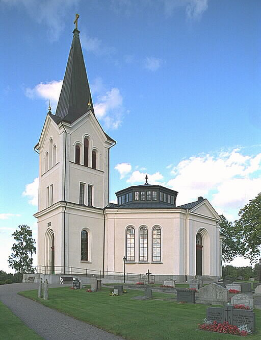 Motiv: Öggestorps kyrka Kategori: (01) ExteriörerÖggestorps kyrka